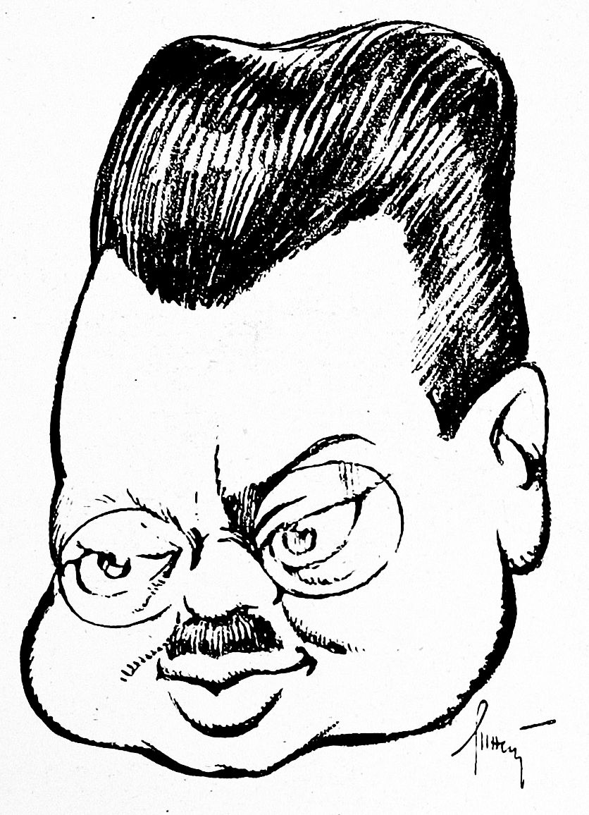 Карикатура М. С. Линского